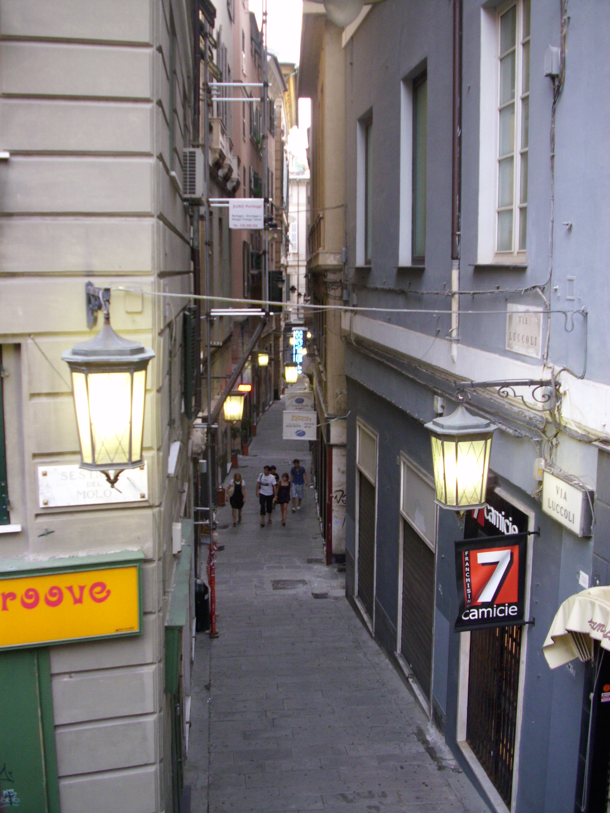 Via Luccoli a Genova